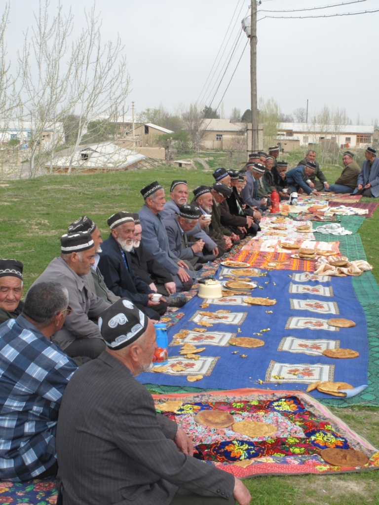 Праздник в сельской местности Иди "Навруз", Таджикистан